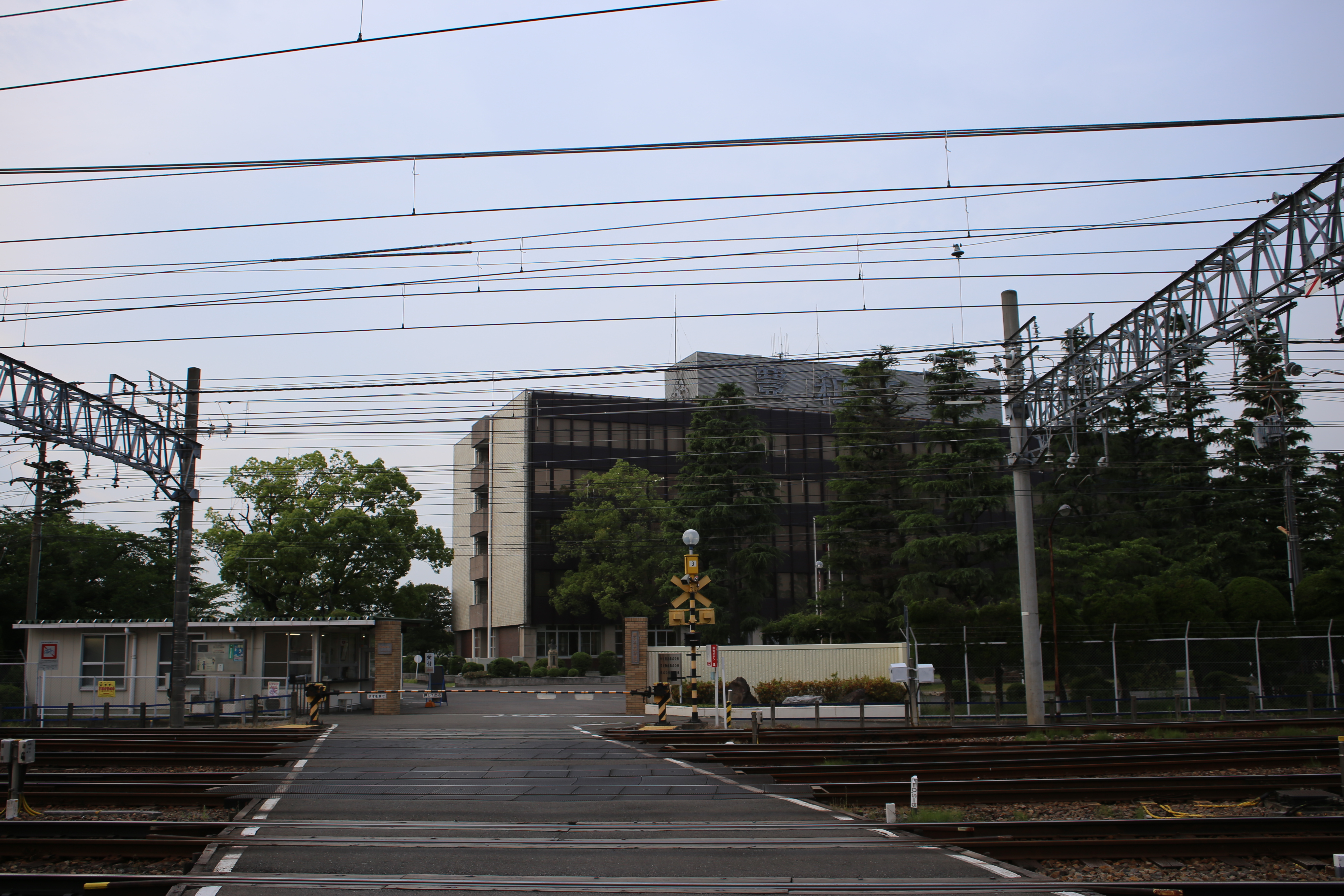 愛知県清須市須ケ口の豊和工業本社を南側踏切より撮影